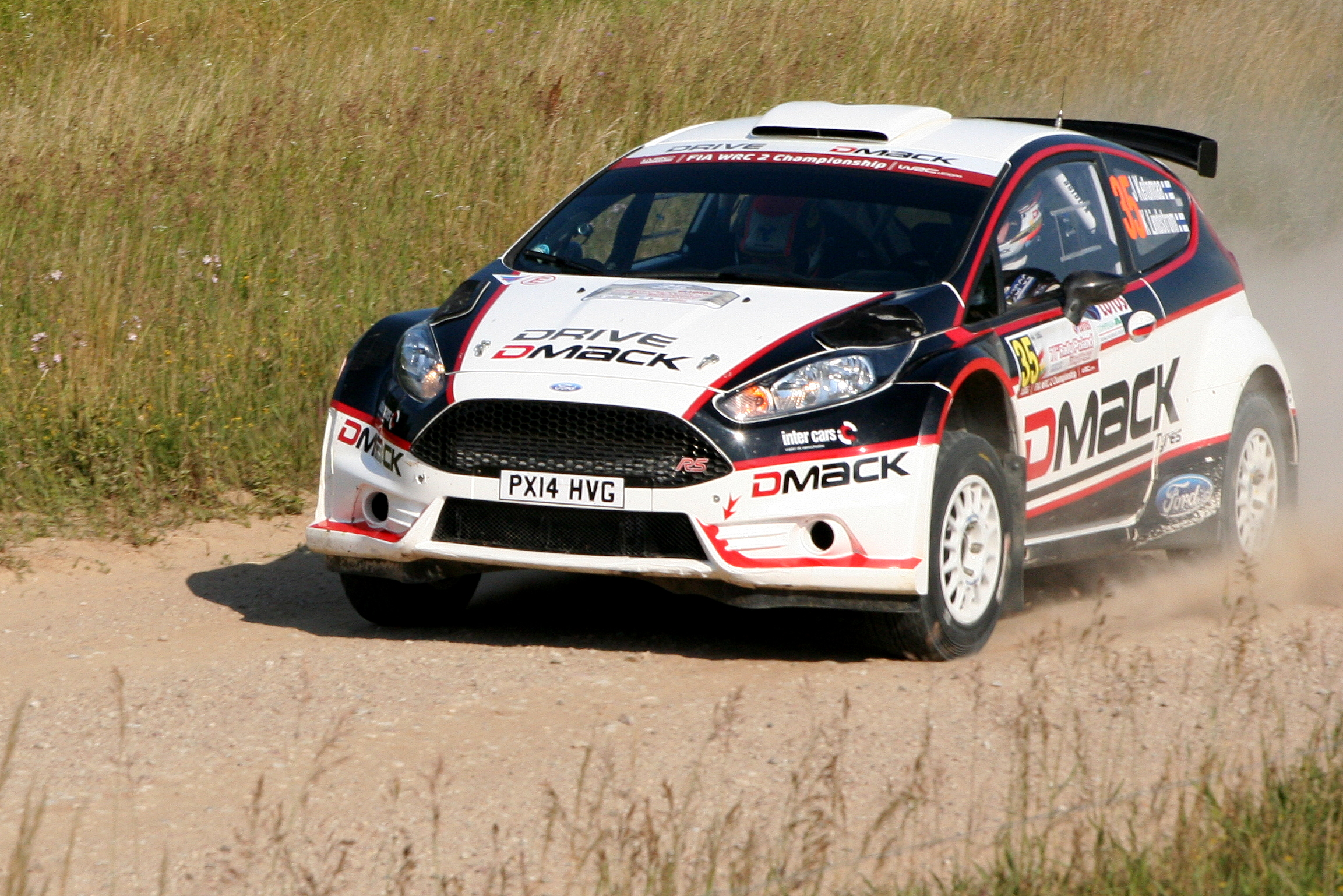 Jari Ketomaa podczas Rajdu Polski 2014, 11 OS Chmielówka 1